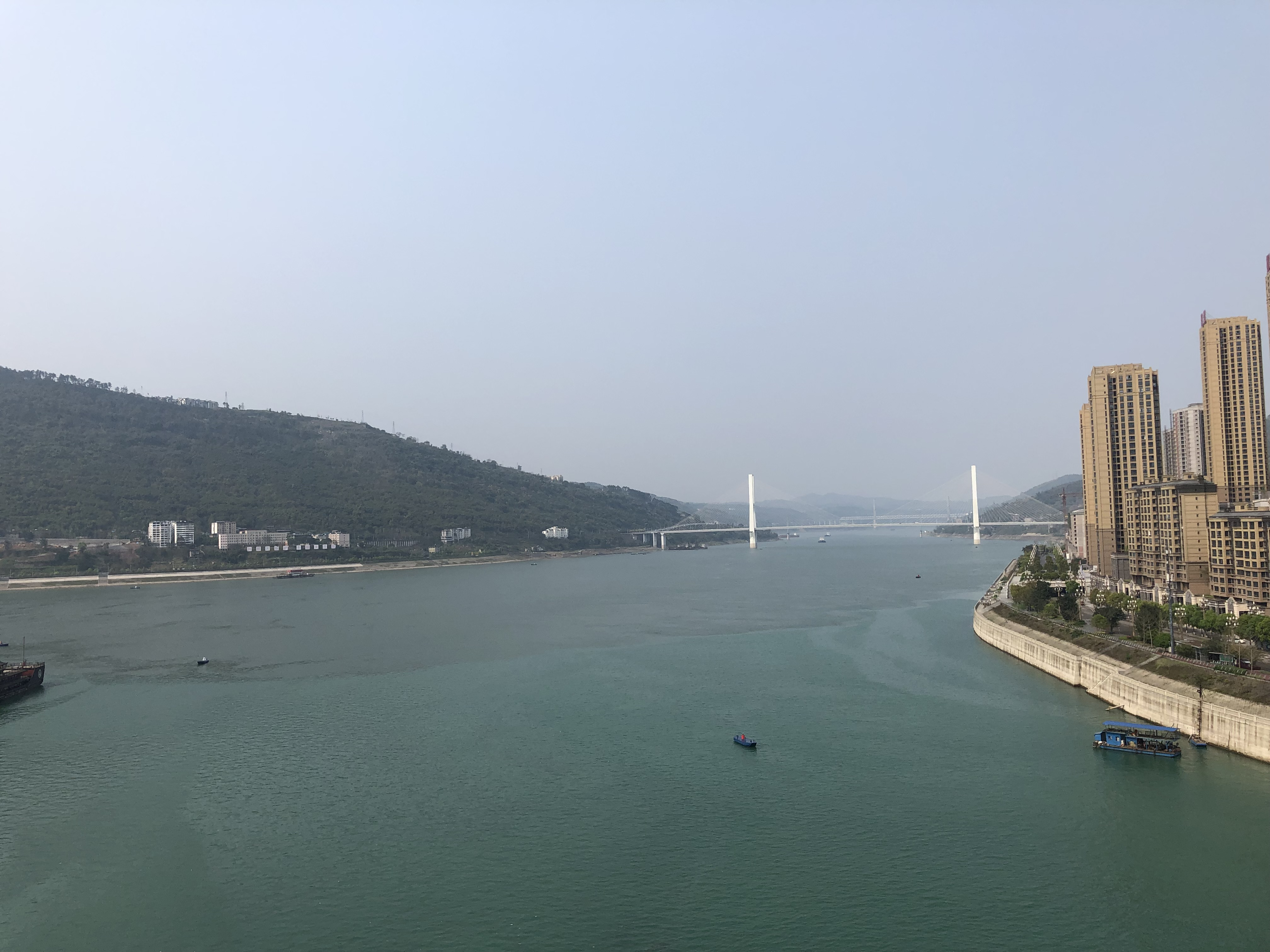 中文（中国大陆）: 乌江汇入长江处